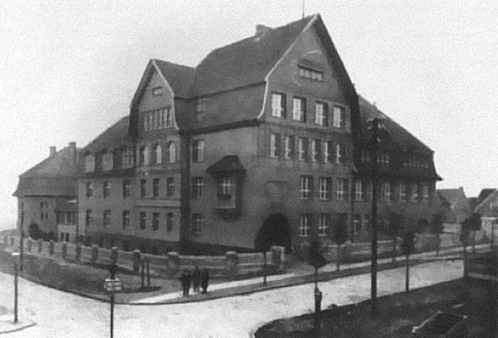 Школа им.Шеффнера в Ратсхофе (Кёнигсберг)